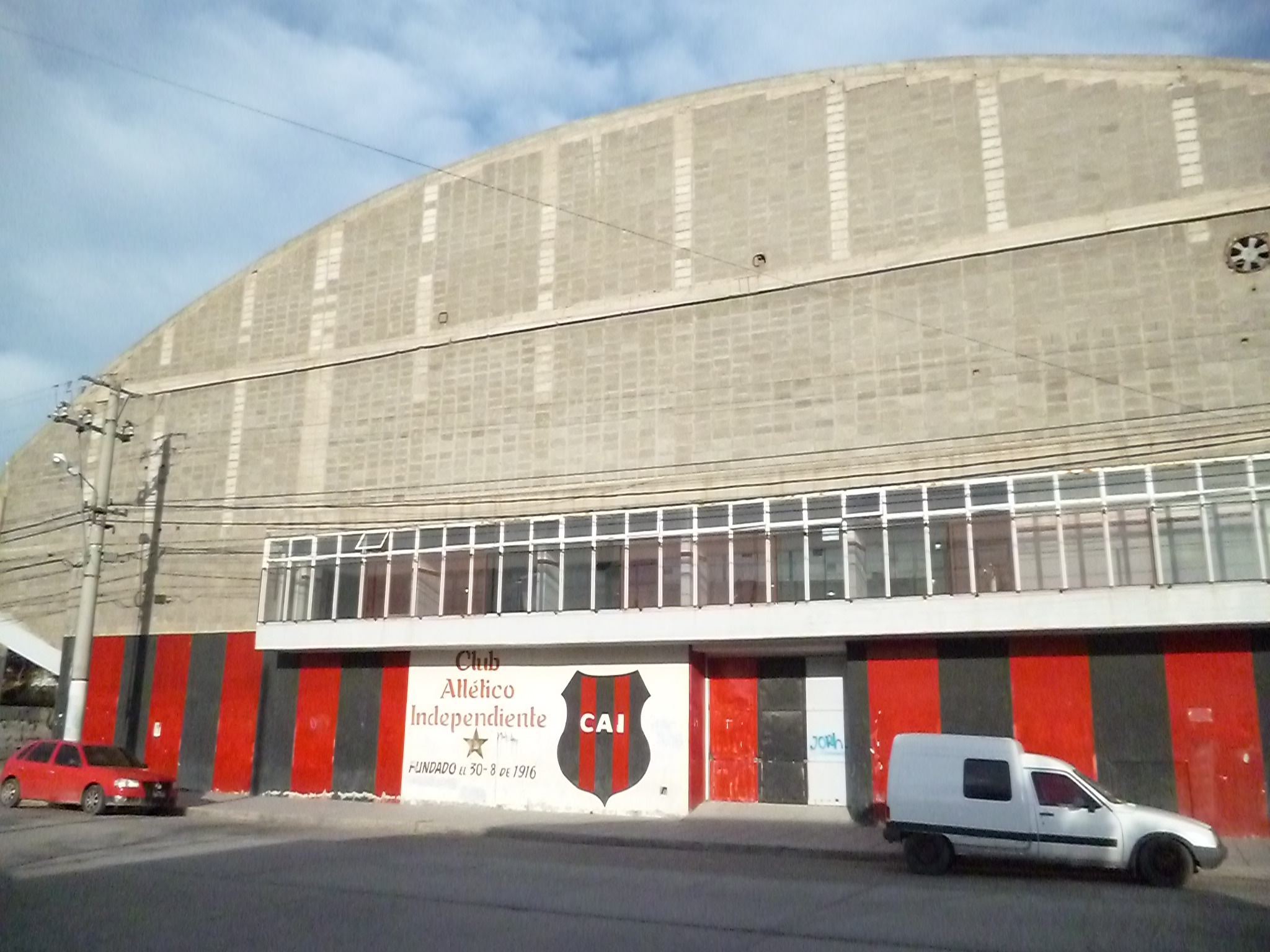 Estadio Nacional del 72, Independiente de Trelew